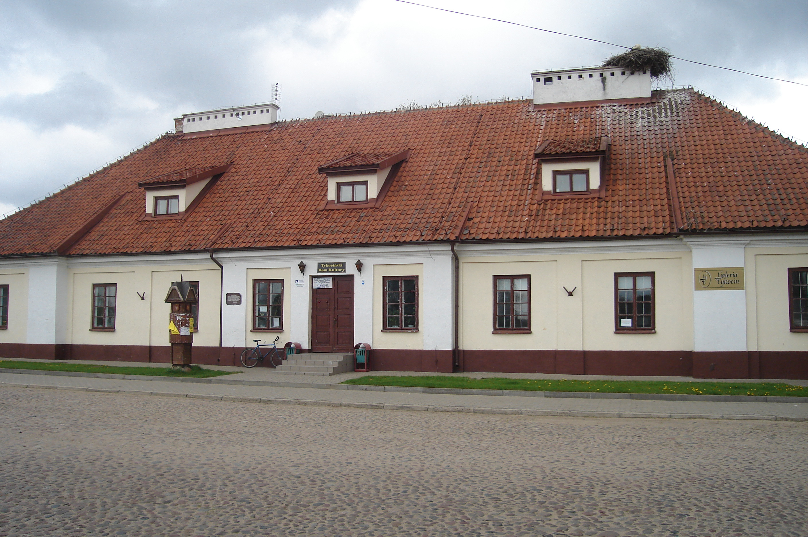 Tykocin, ul. 11 Listopada 8 - dawna rezydencja ekonomiczna, szkoła, obecnie Centrum Kultury, Sportu i Turystyki Ziemi Tykocińskiej